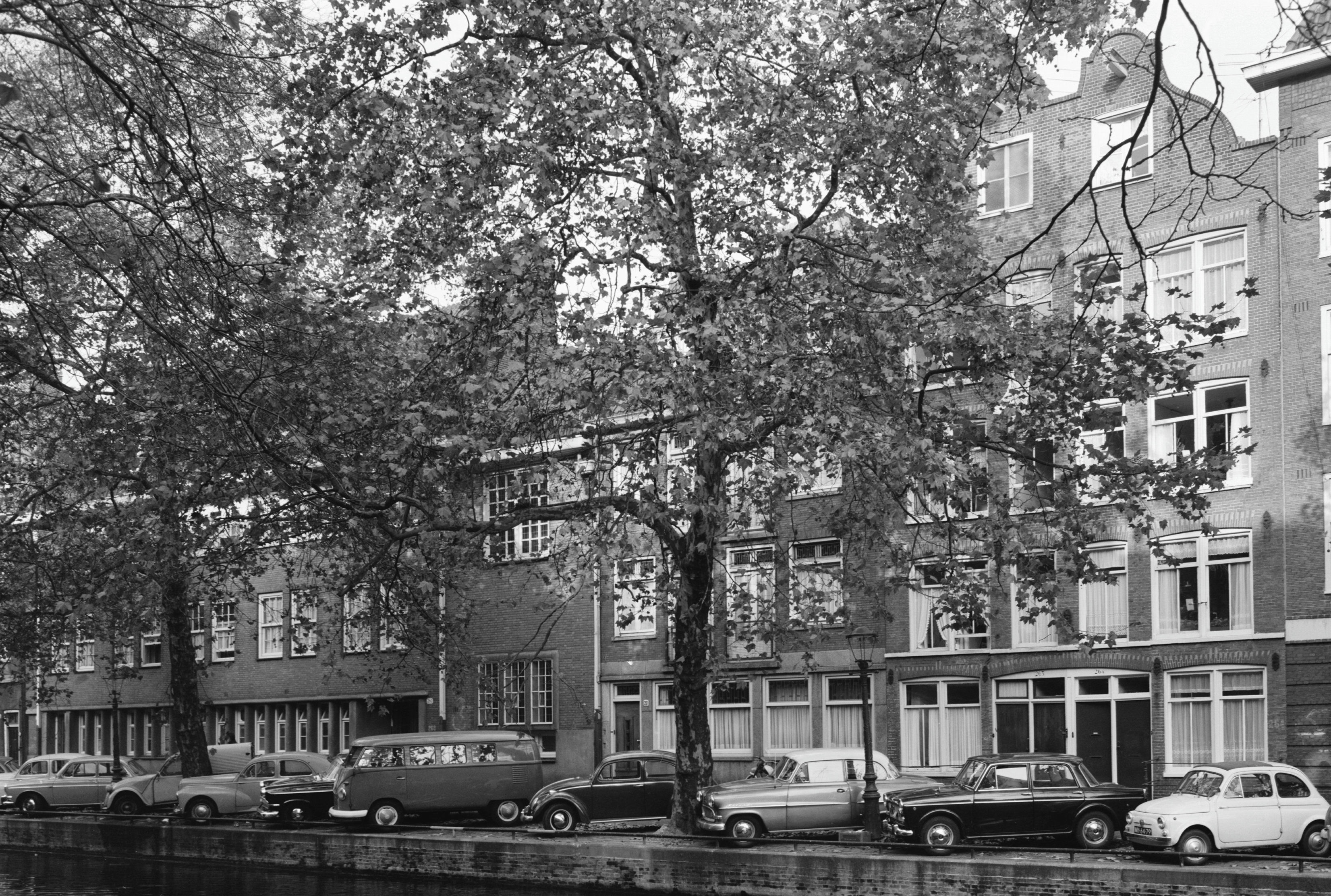 voorgevels